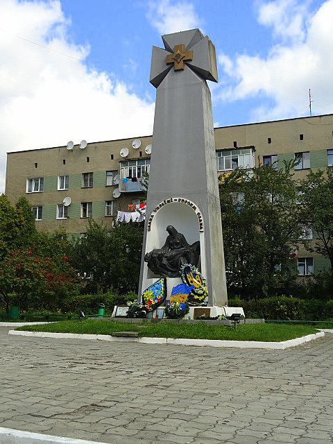 Памятный крест борцам за волю Украины. г. Новый Роздол Львовской области Украины